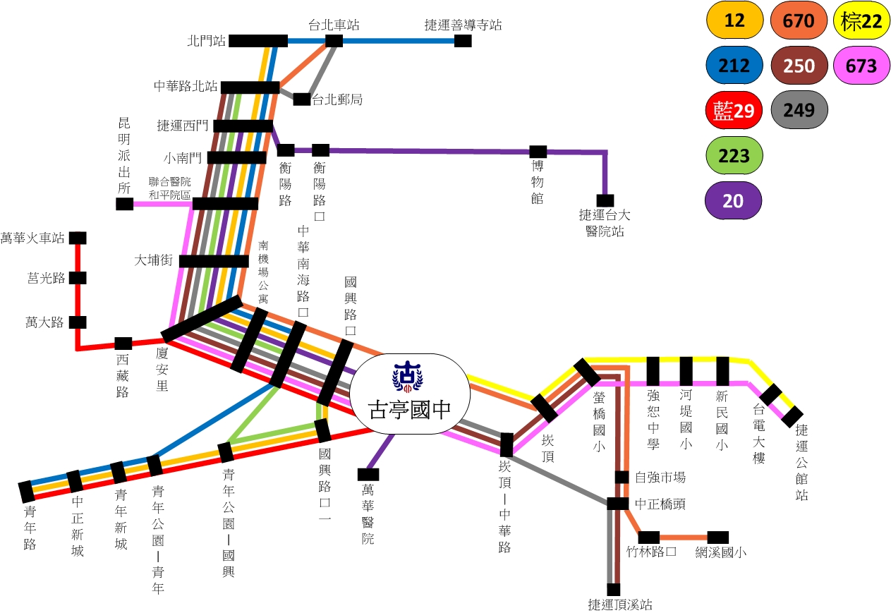 古亭國中公車路線